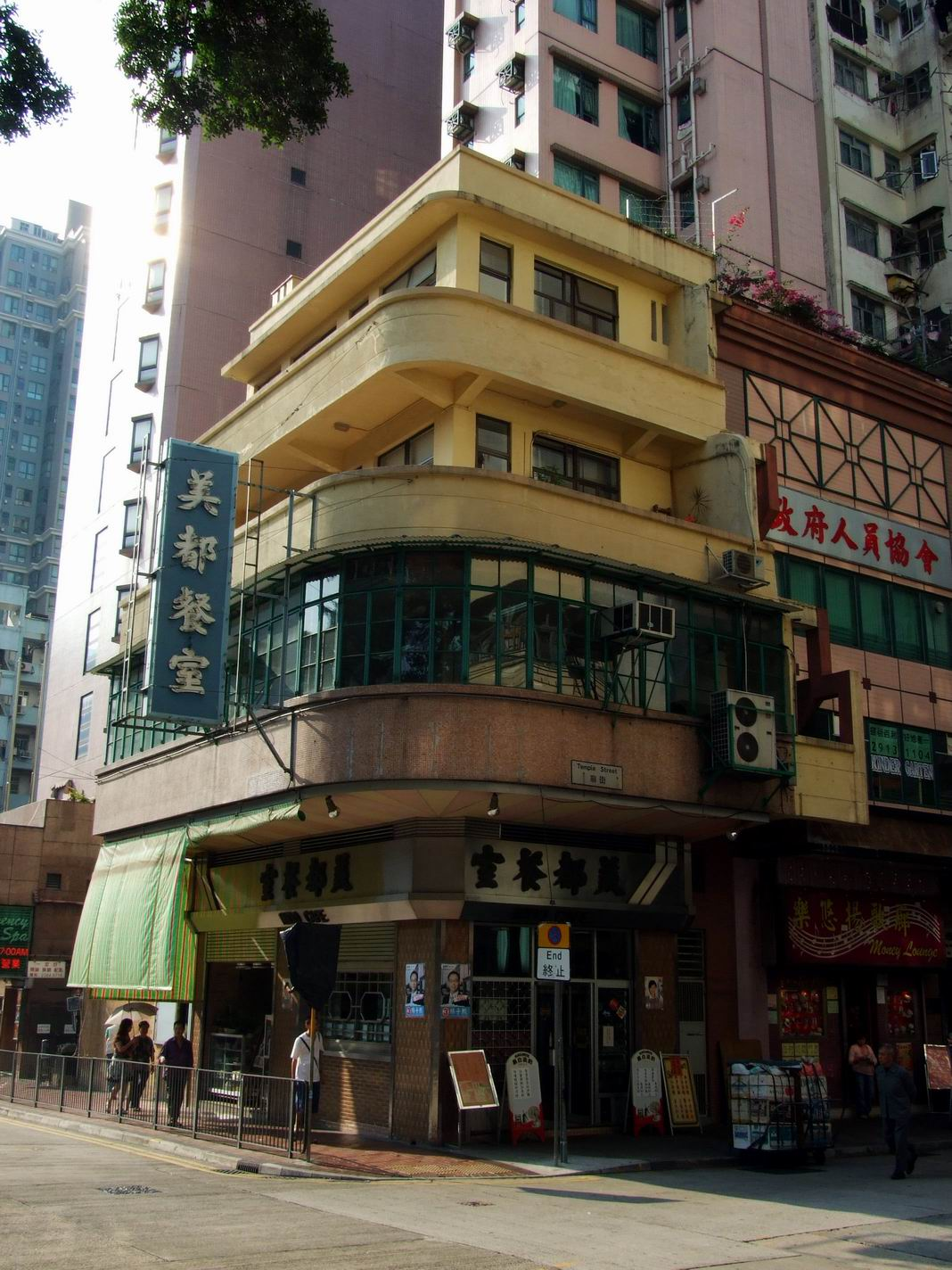 美都餐室